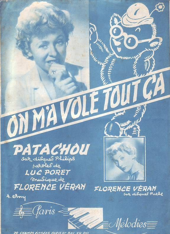 Partition de "On m'a volé tout ça" écrit par Luc Poret / Florence Vérant, chantée par Patachou